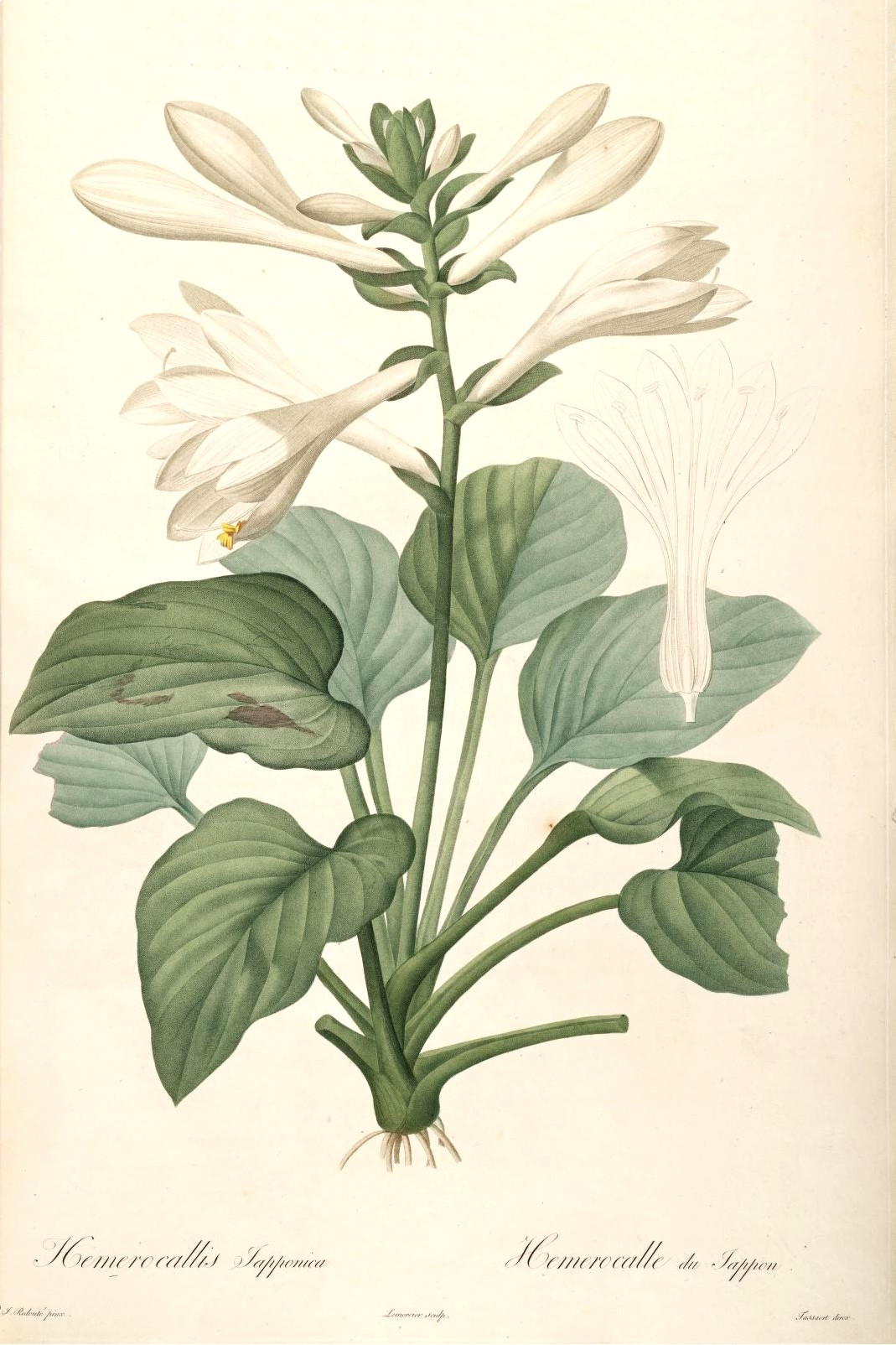 Hemerocallis plantaginea var. japonica Kikuchi et Maekawa, 1940